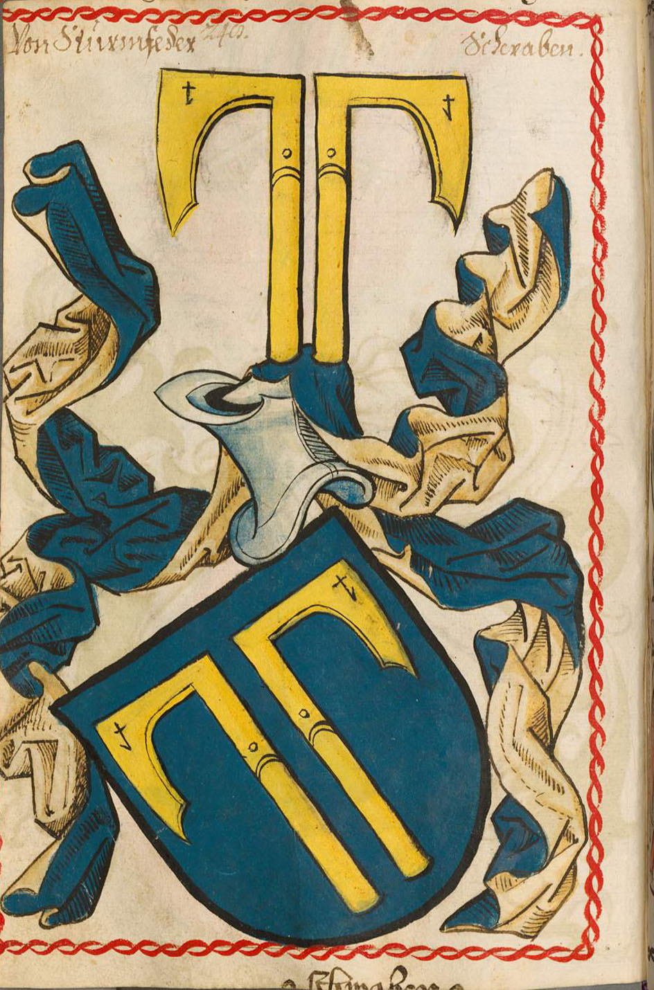 Scheibler'sches Wappenbuch, älterer Teil Sturmfeder